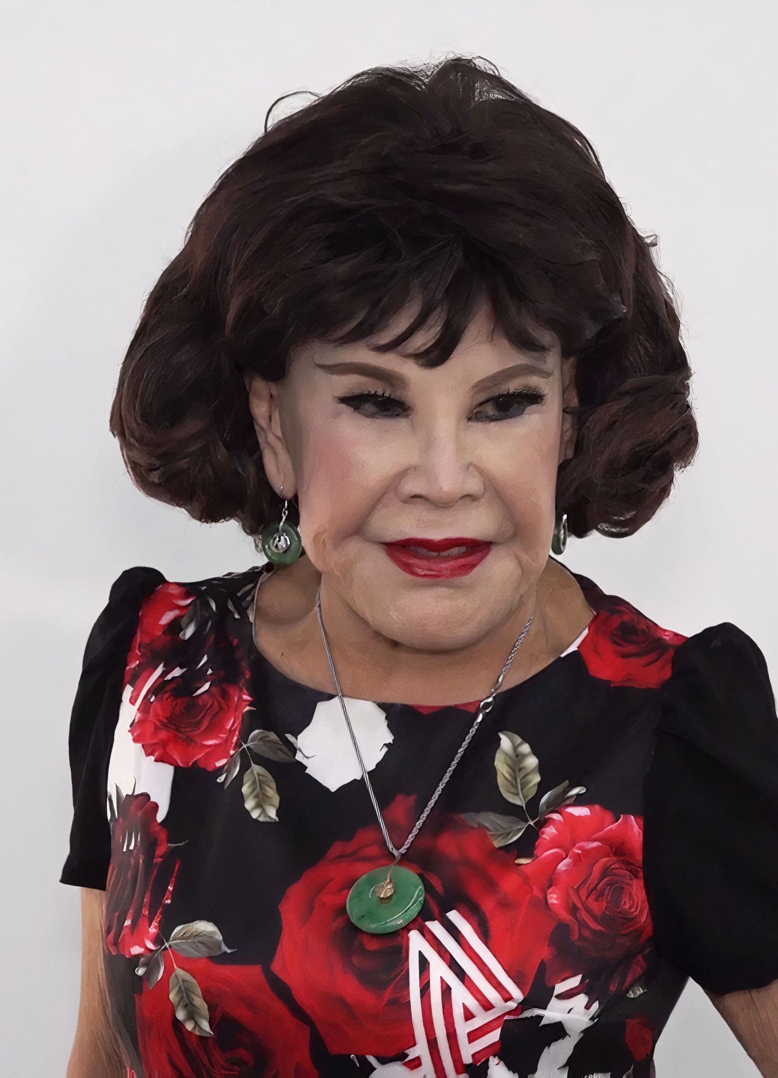 中文（香港）: 接受網絡節目《關公有請》訪問